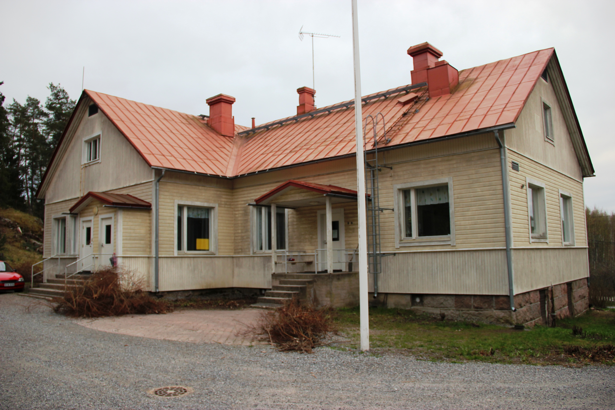 Karstun koulu, Karstu, Lohja